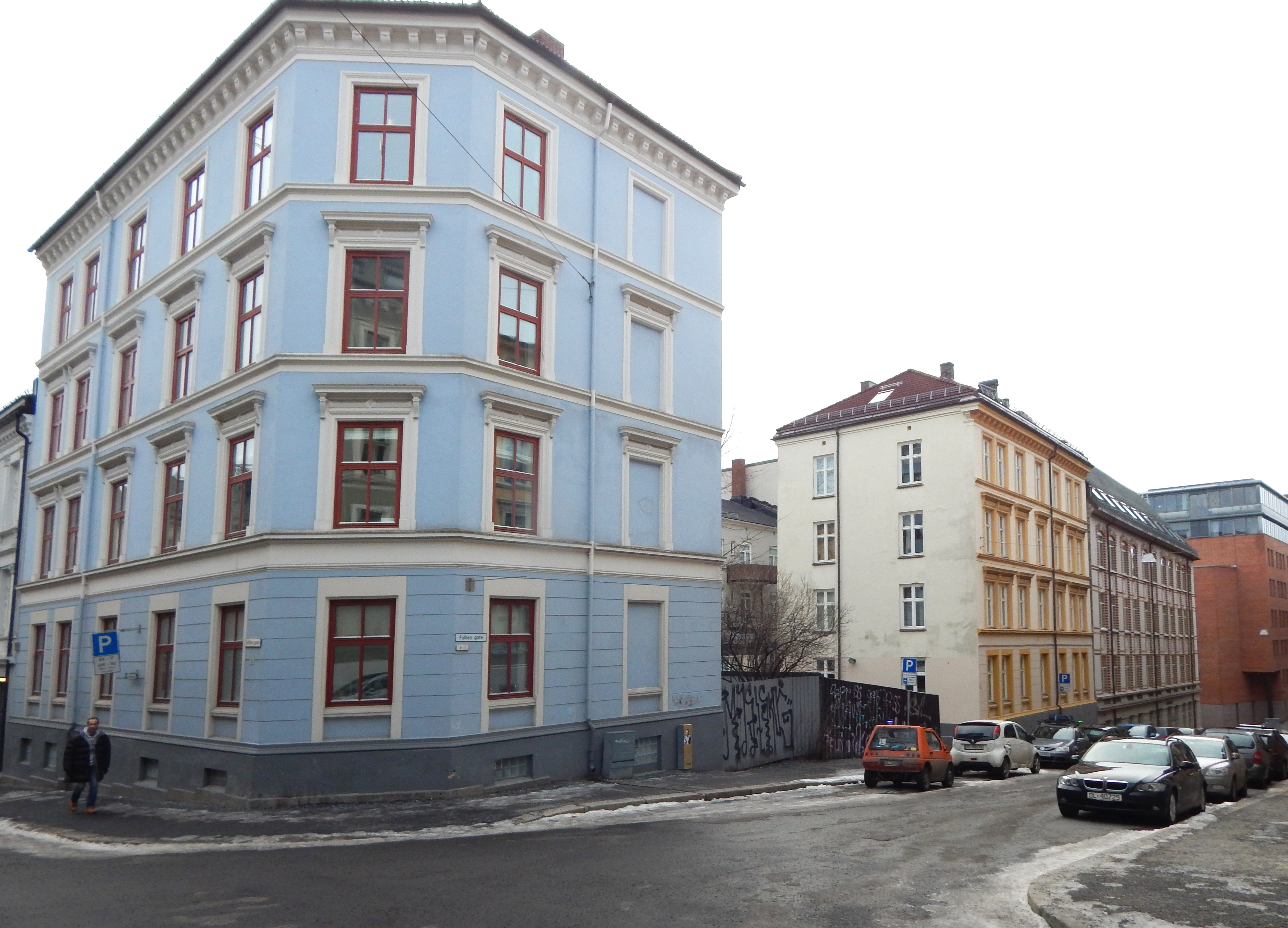 Sofies gate 8 med Falbes gate til høyre